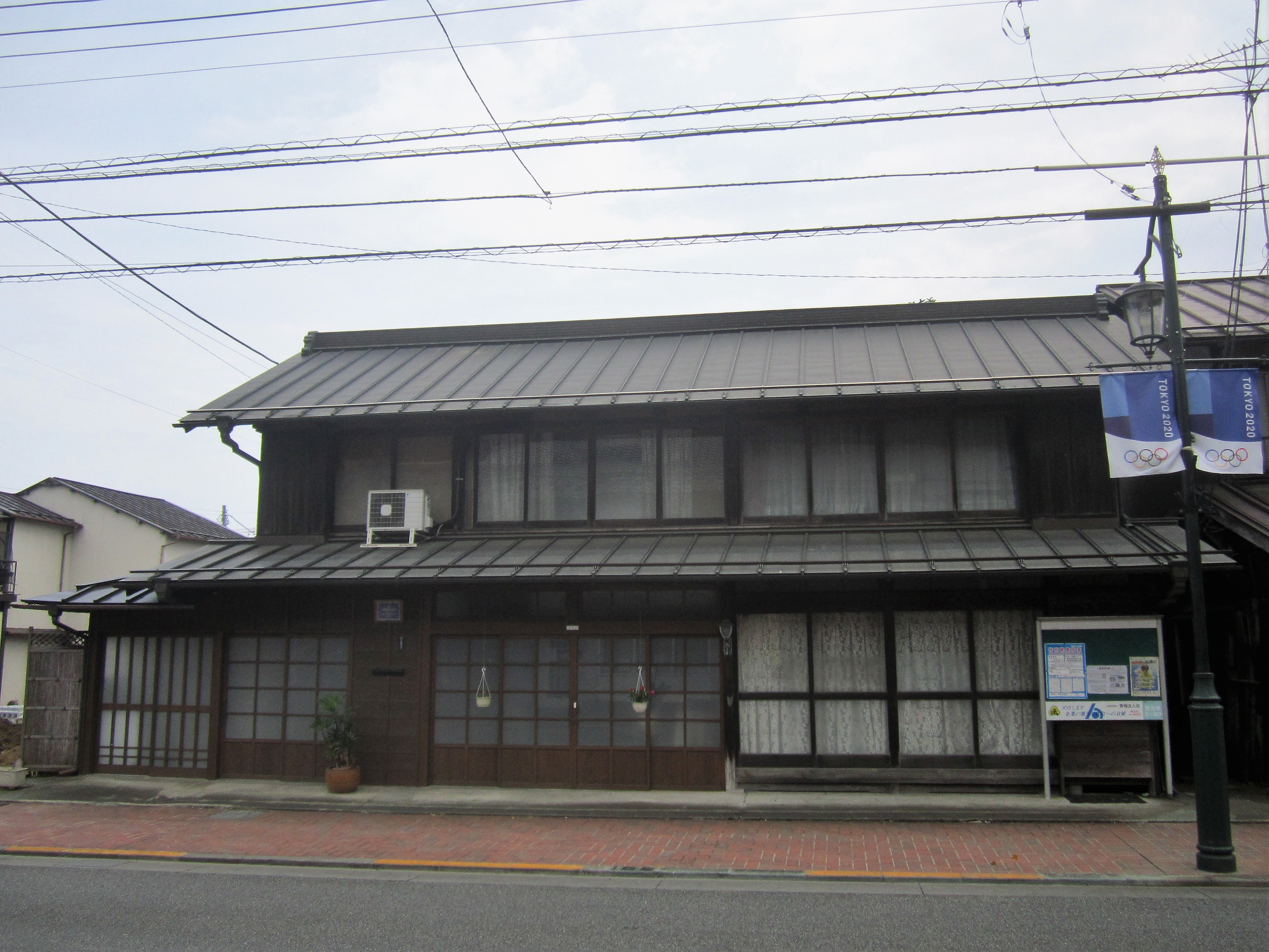 宇津木家住宅主屋（青梅市西分町）